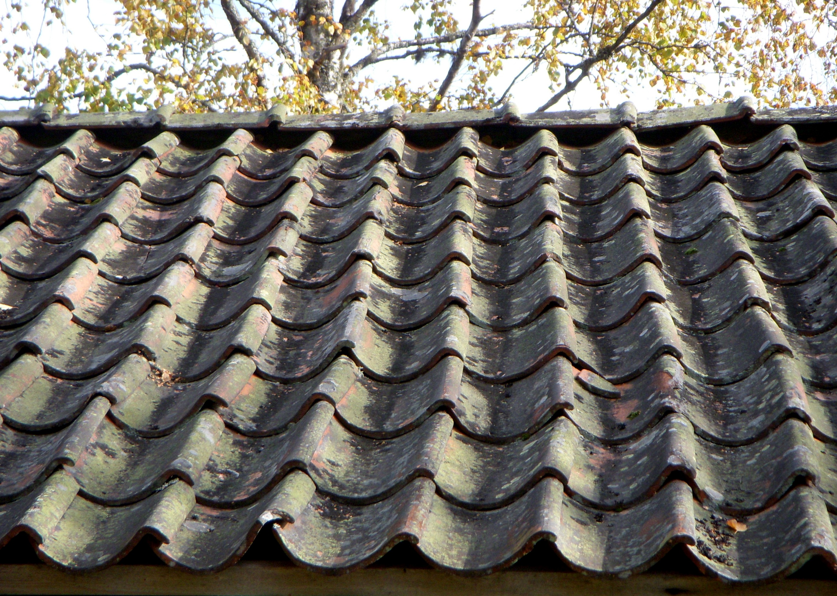 Enkupigt taktegel på en fäbod på Gasenberget